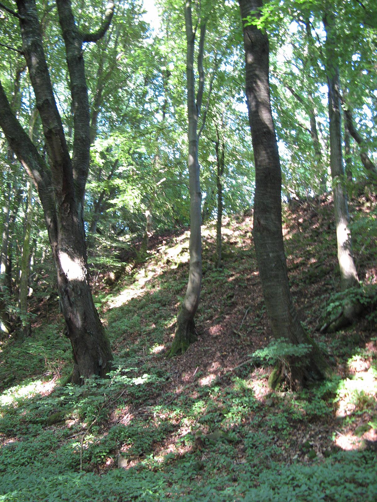 Rödchesmauer an der Dornburg, Hessen. Reste einer Ringmauer eines Keltischen Oppidum